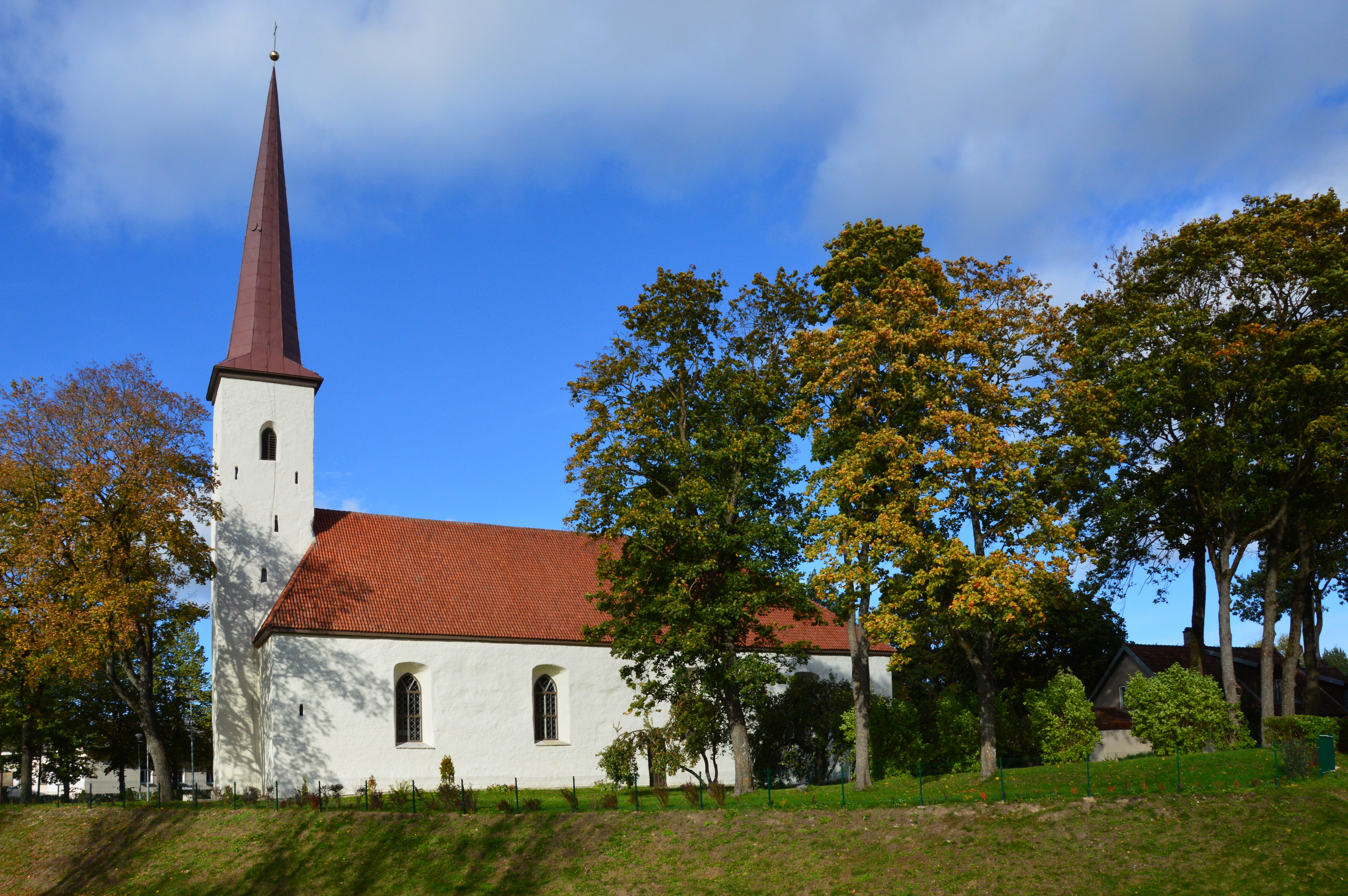 Jõhvi kirik vallikraaviga